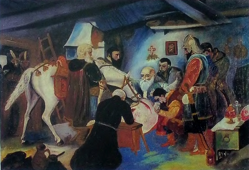 Смерть гетьмана Сагайдачного. Олія на полотні, 69×94 см.